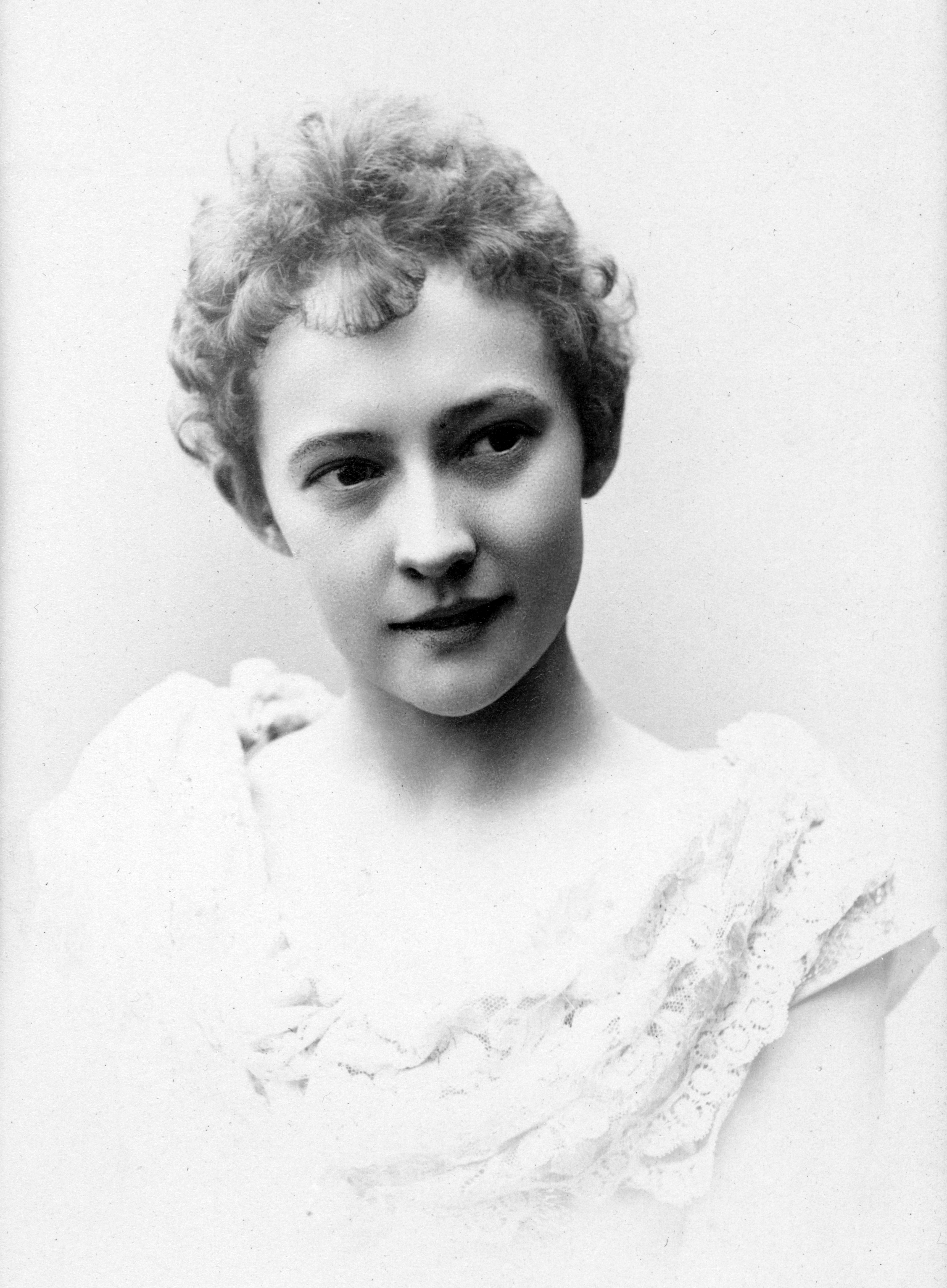 Victoria Strandin, balettelev vid Kungliga Operan 1894